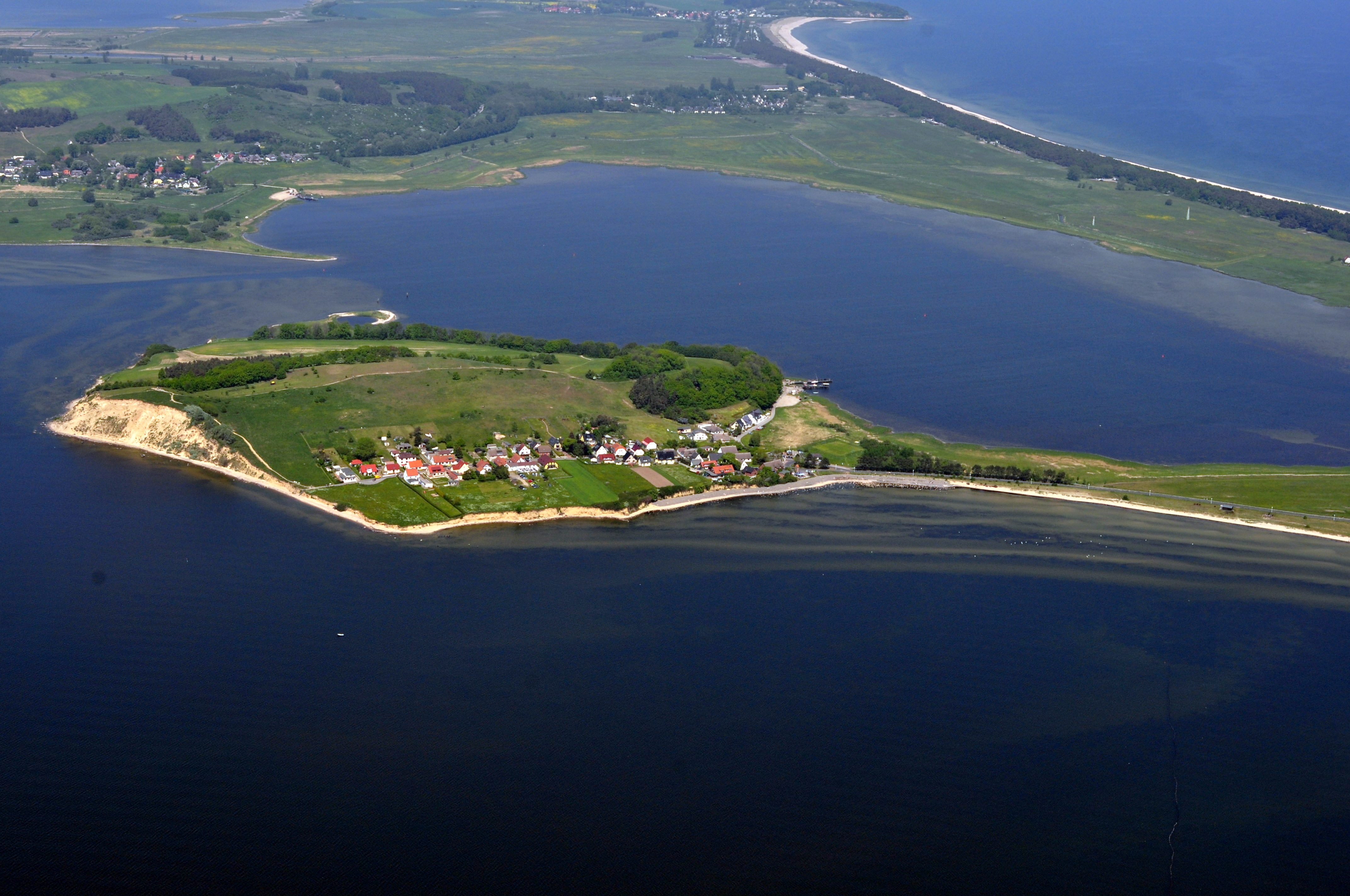 Die Bilder wurden von mir während eines einstündigen Rundflugs ab Flugplatz Güttin am 21. Mai 2011 aufgenommen. Die Bildbeschreibung steht im Dateinamen. Aufgenommen mit einer Nikon D5000 durch das Seitenfenster des Flugzeugs.